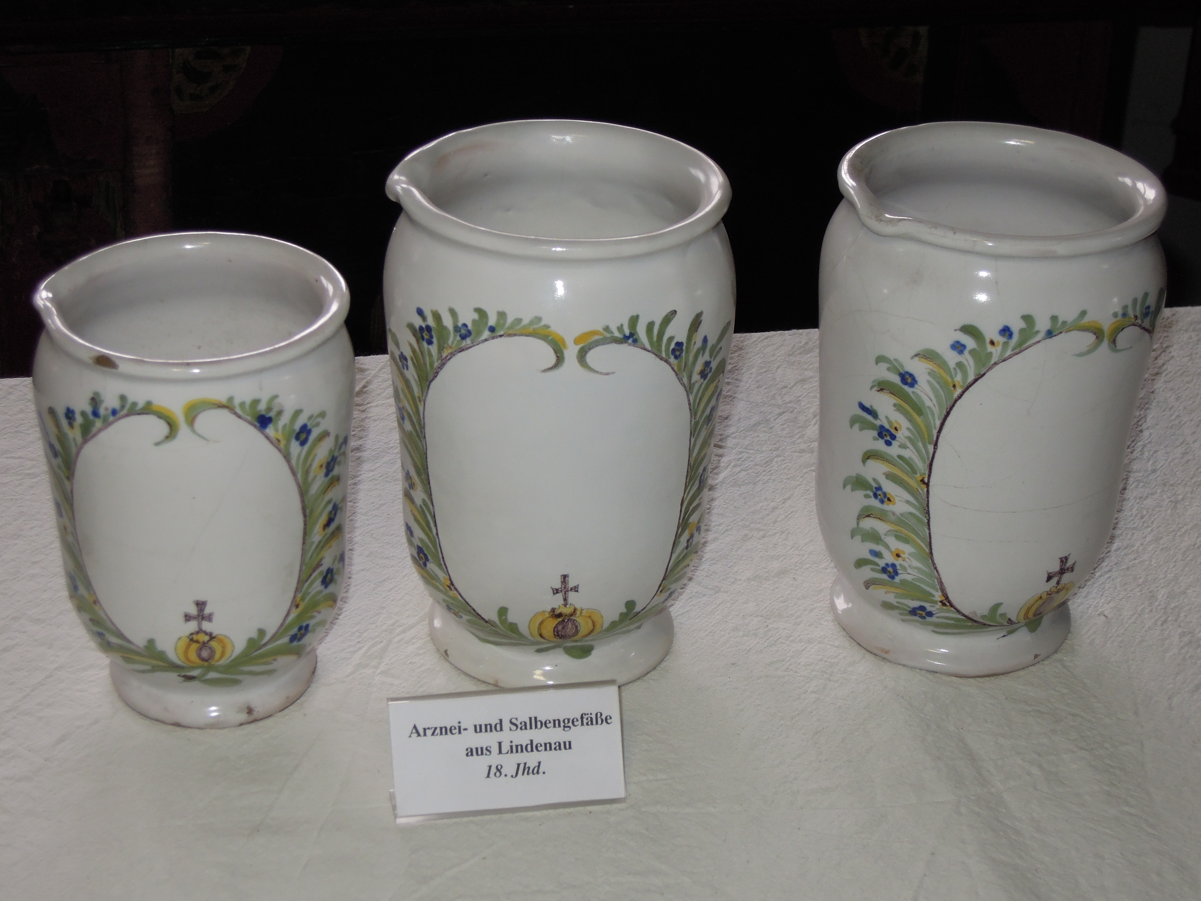 Salbengefäße aus der Klosterapotheke Lindenau